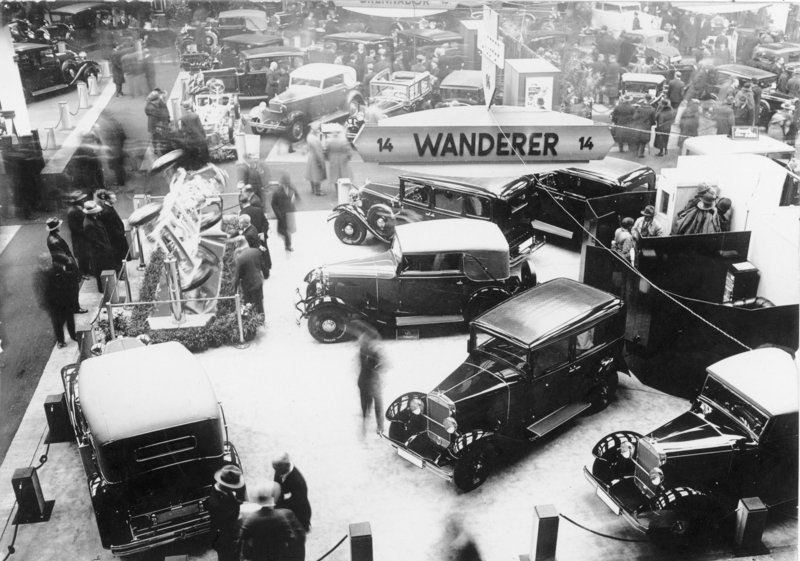 Die Eröffnung der grossen Automobilausstellung in den Ausstellungshallen am Kaiserdamm in Berlin! Blick in die Halle der Luxus-Automobile, im Vordergrund der Stand der Wanderer-Werke.